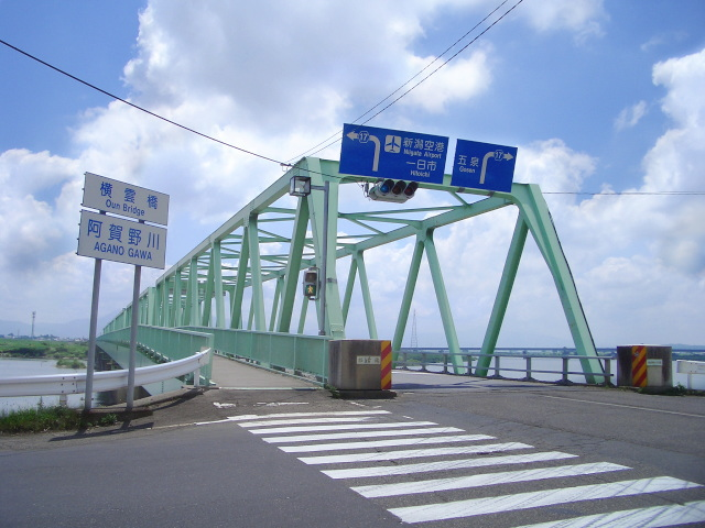 阿賀野川に架かる横雲橋。新潟県新潟市側(左岸)より。